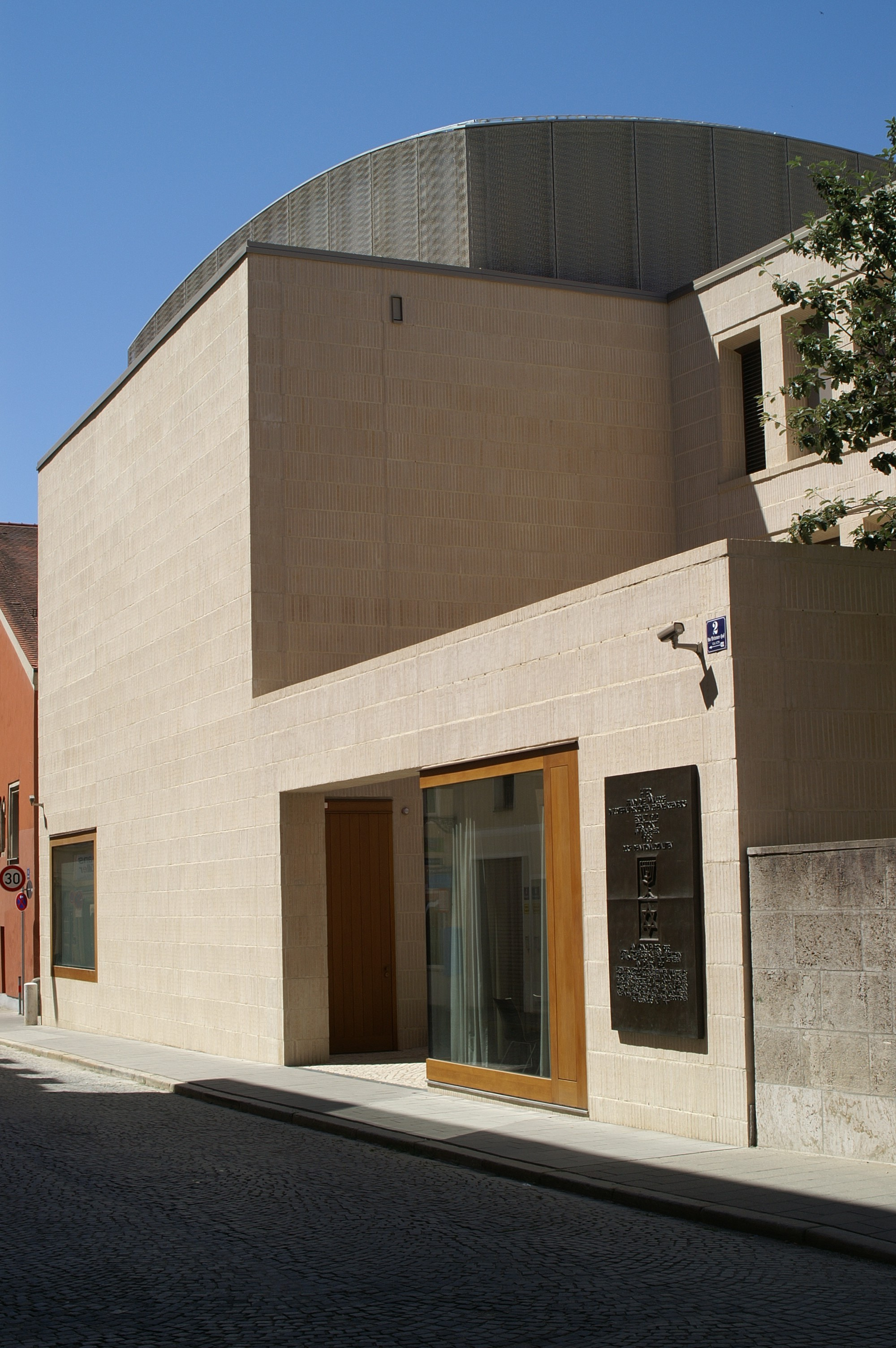 Jüdisches Gemeindezentrum Regensburg, Ansicht von Norden